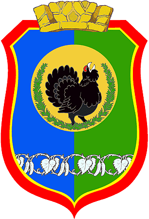 Герб г.Нягань (Ханты-Мансийский Автономный округ)